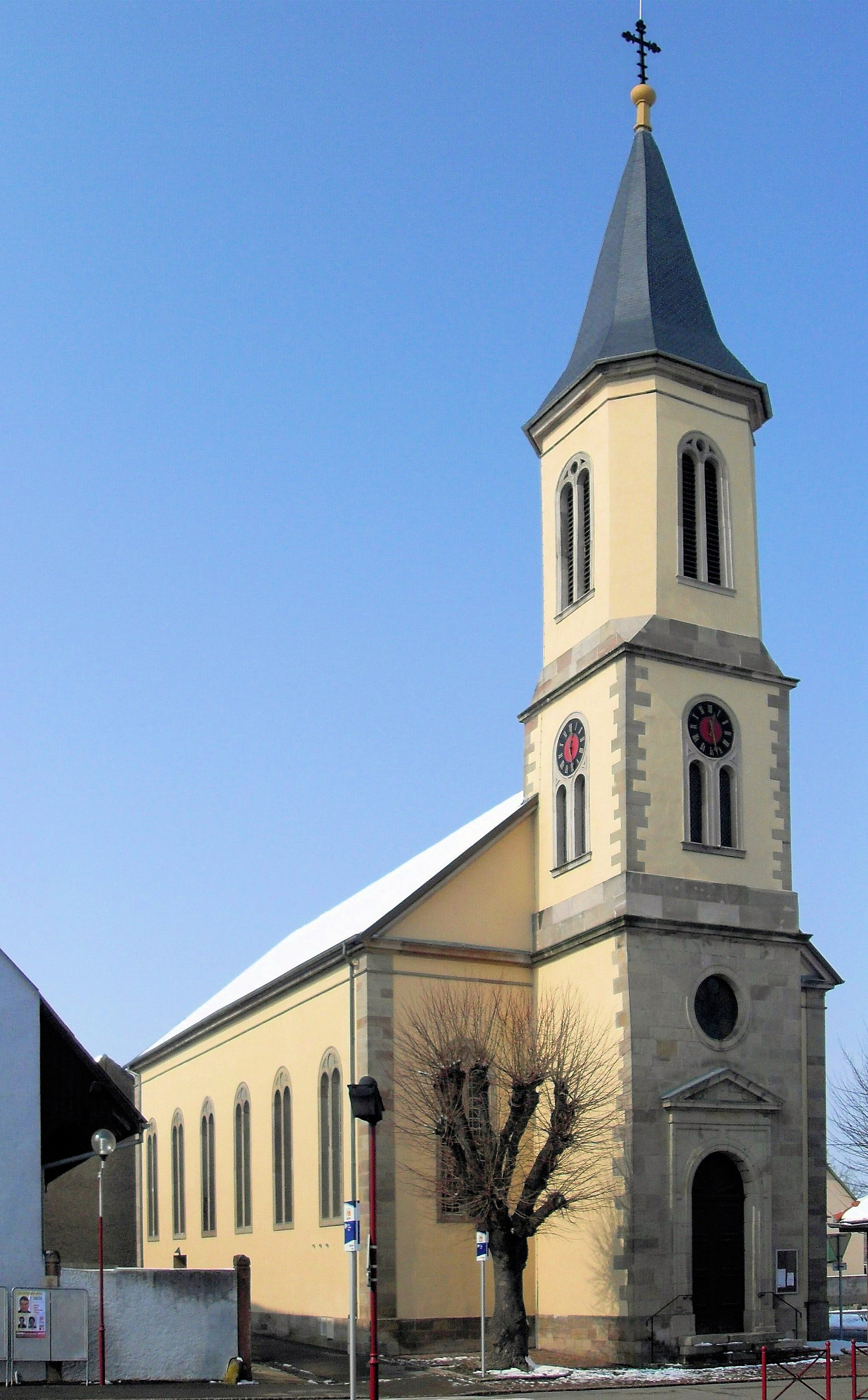 L'église luthérienne à Algolsheim